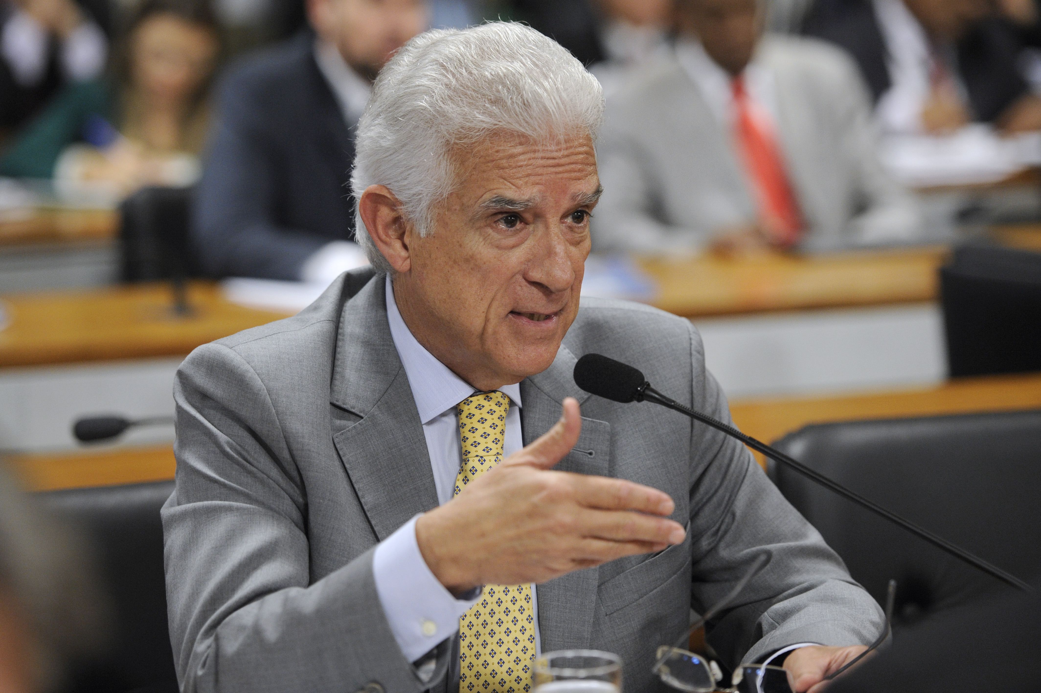 Sala de comissões do Senado Federal durante a Comissão Parlamentar Mista de Inquérito (CPMI) da Petrobras. A CPMI faz rreunião administrativa para votação de requerimentos (436). Entre os mais de 400 itens da pauta, estão pedidos de convocação de políticos, como Gleisi Hoffmann, Alvaro Dias, Delcídio Amaral e Aécio Neves. Há ainda convites para que a presidente Dilma e o ex-presidente Lula prestem depoimento. Em pronuciamento, deputado Rubens Bueno (PPS-PR) Foto: Jefferson Rudy/Agência Senado